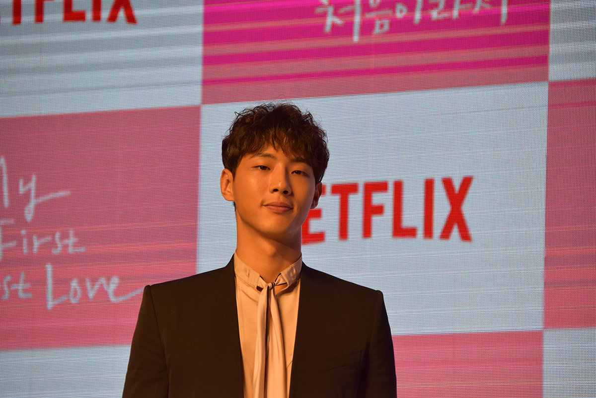 지수 넷플릭스오리지널 '첫사랑은 처음이라서' (My First First Love) 제작발표회 (2019.4.12)